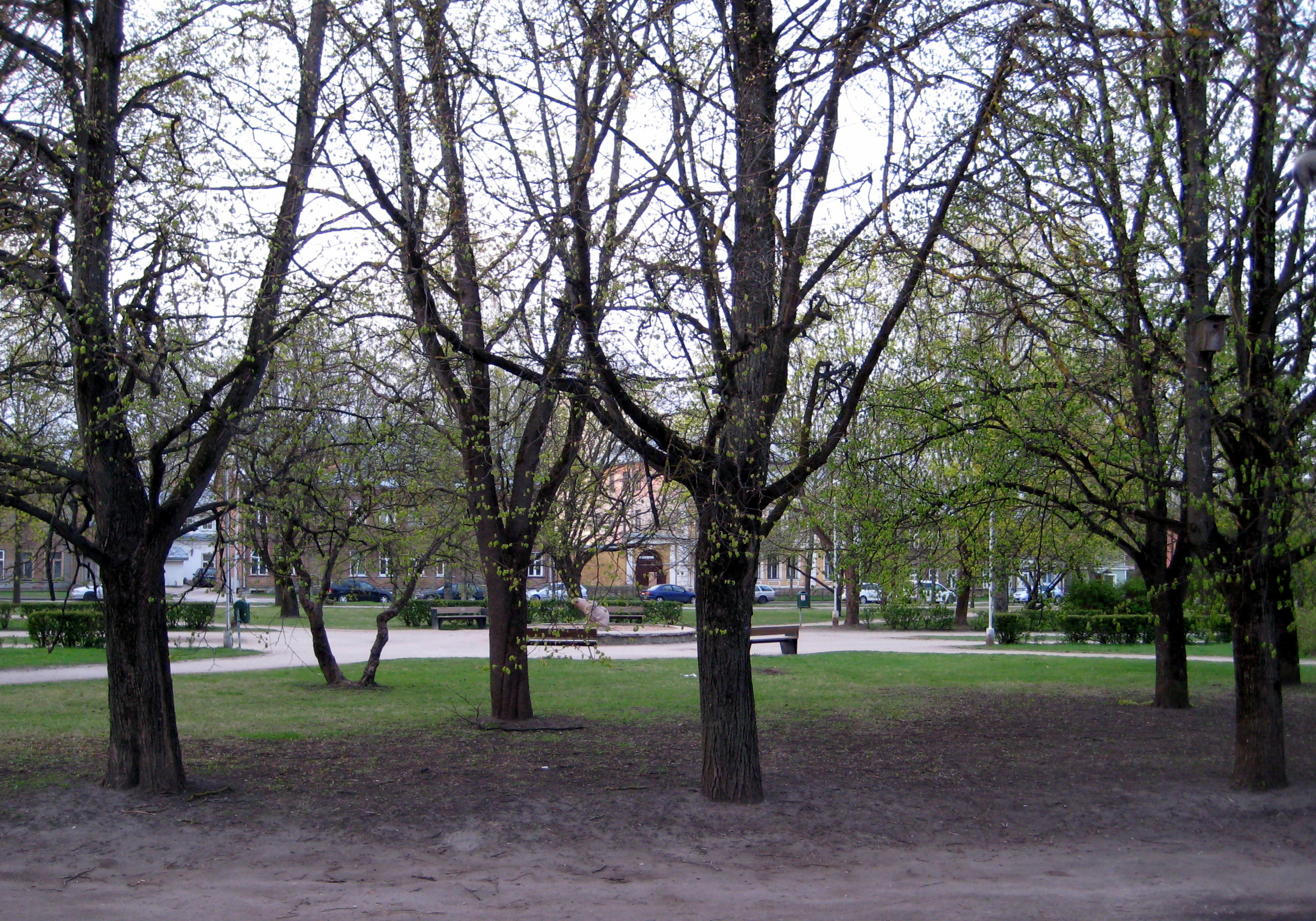 Vaksali park Tartus, pildistatud Tõnissoni tänava poolt